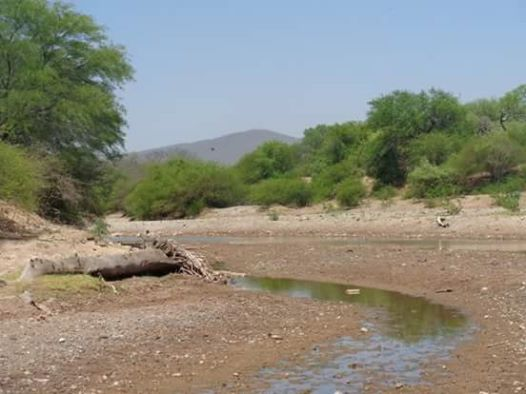 Río Horcones